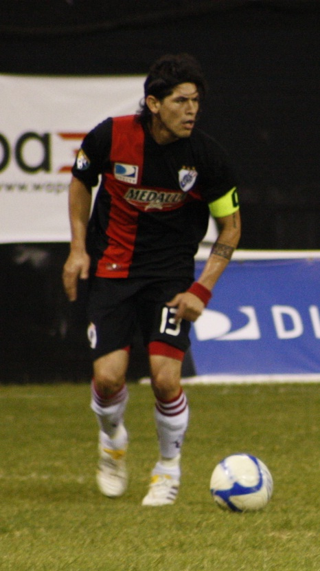 el argentino Paulo Centurion controlando el balon en el juego disputado entre el Club Atletico River Plate (Puerto Rico) contra Guaynabo Fluminense FC (Puerto Rico) en el Estadio Juan Ramón Loubriel, en Bayamon